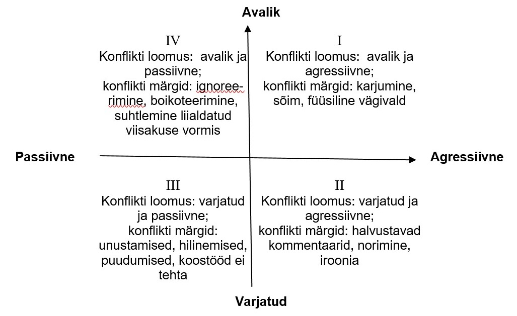 Konflikti avaldumise erinevad võimalused lähtuvalt avalikkuse ja aktiivsuse astmest